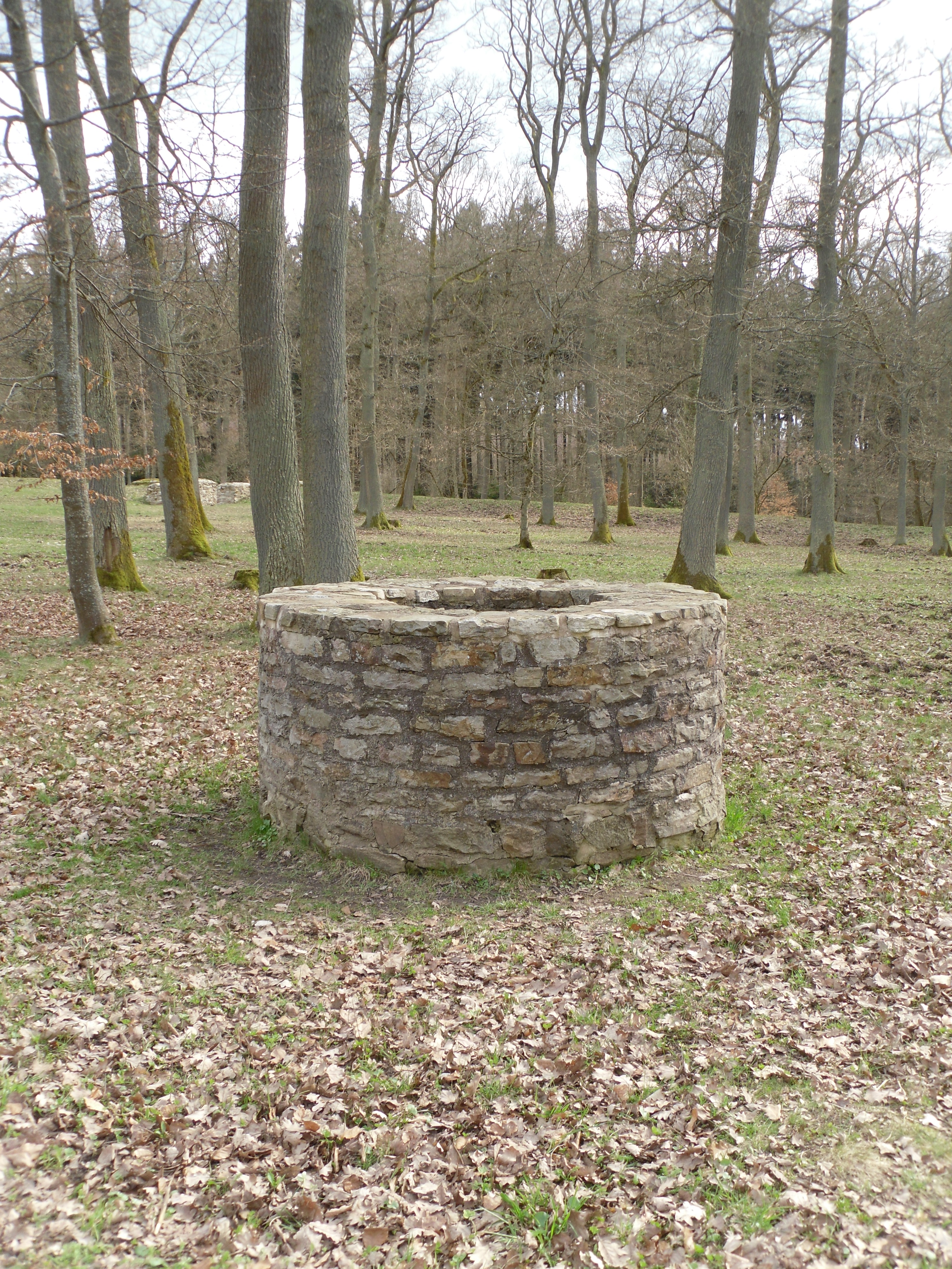 Ruine eines Brunnens im Kastell Glauburg.